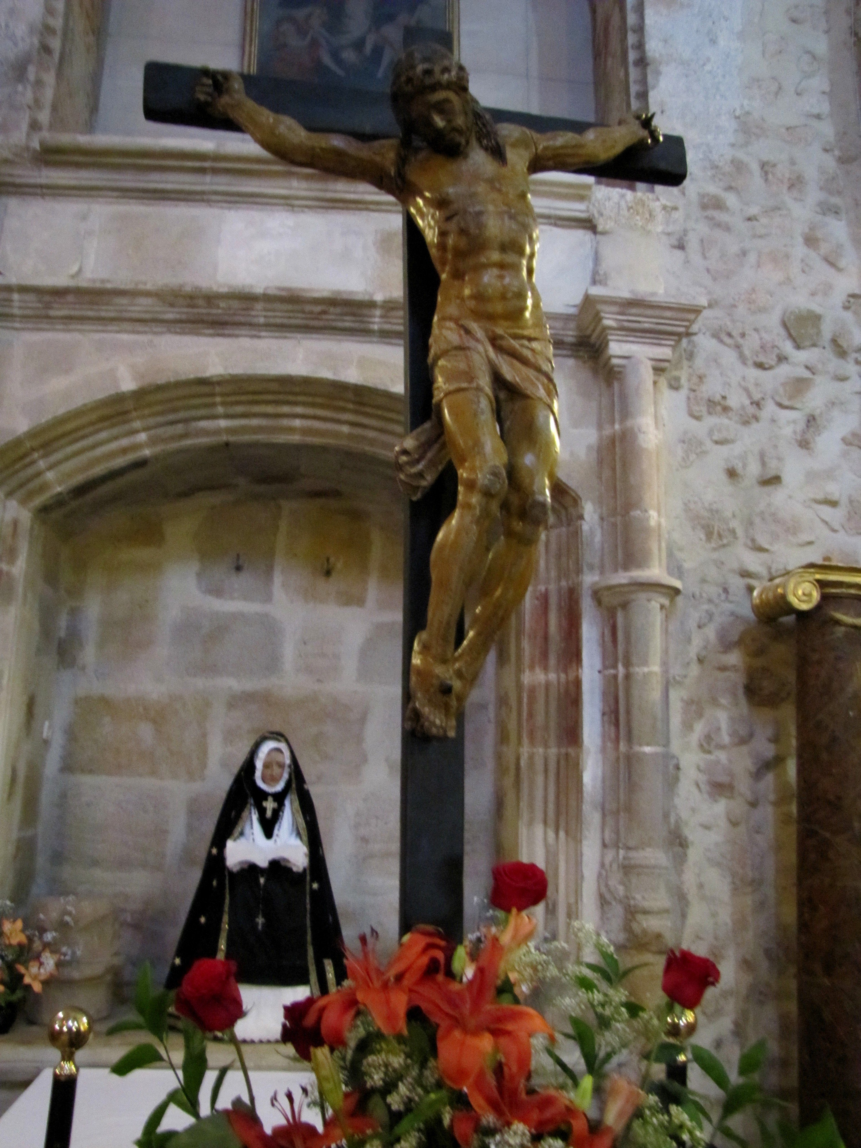 Crucifijo Serón de Nágima.